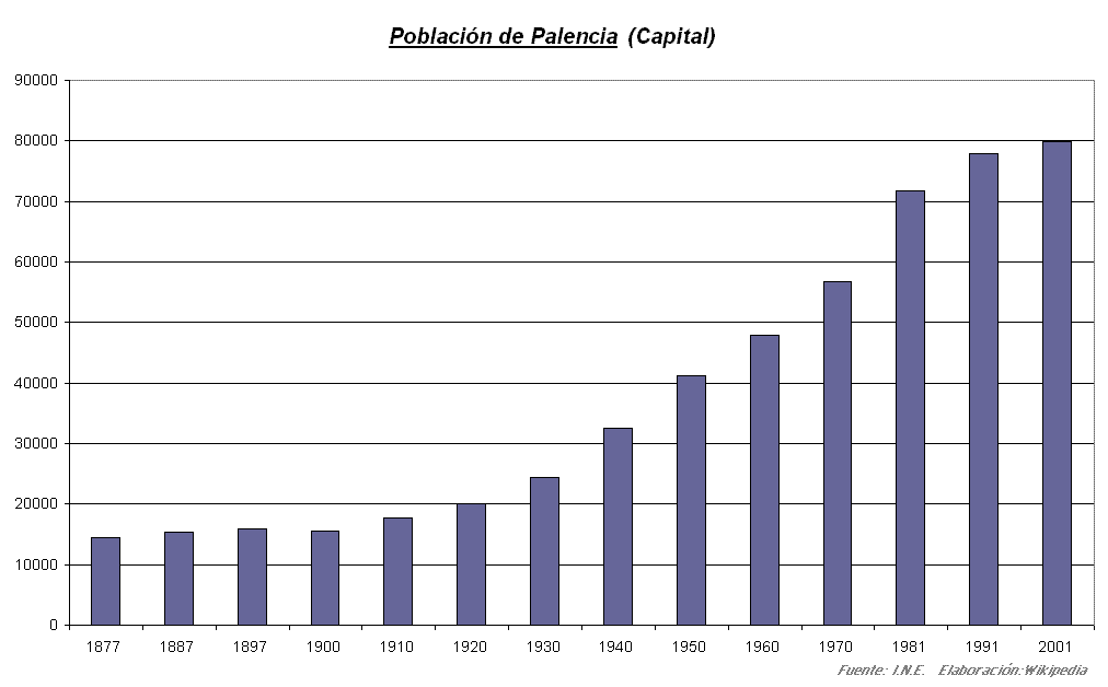 Descripción / Description: Población de la ciudad de Palencia, España, (1877-2001). Palencia's population, Spain, (1877-2001). Fuente / Source: Instituto Nacional de Estadística (INE)/ National Statistics Institute (INE) Autor / Author: Es-montgomery Fecha / Date: 7-Febrero-2007 Permiso / Permission: Trabajo propio de libre difusión. / Own work. Free diffusion.